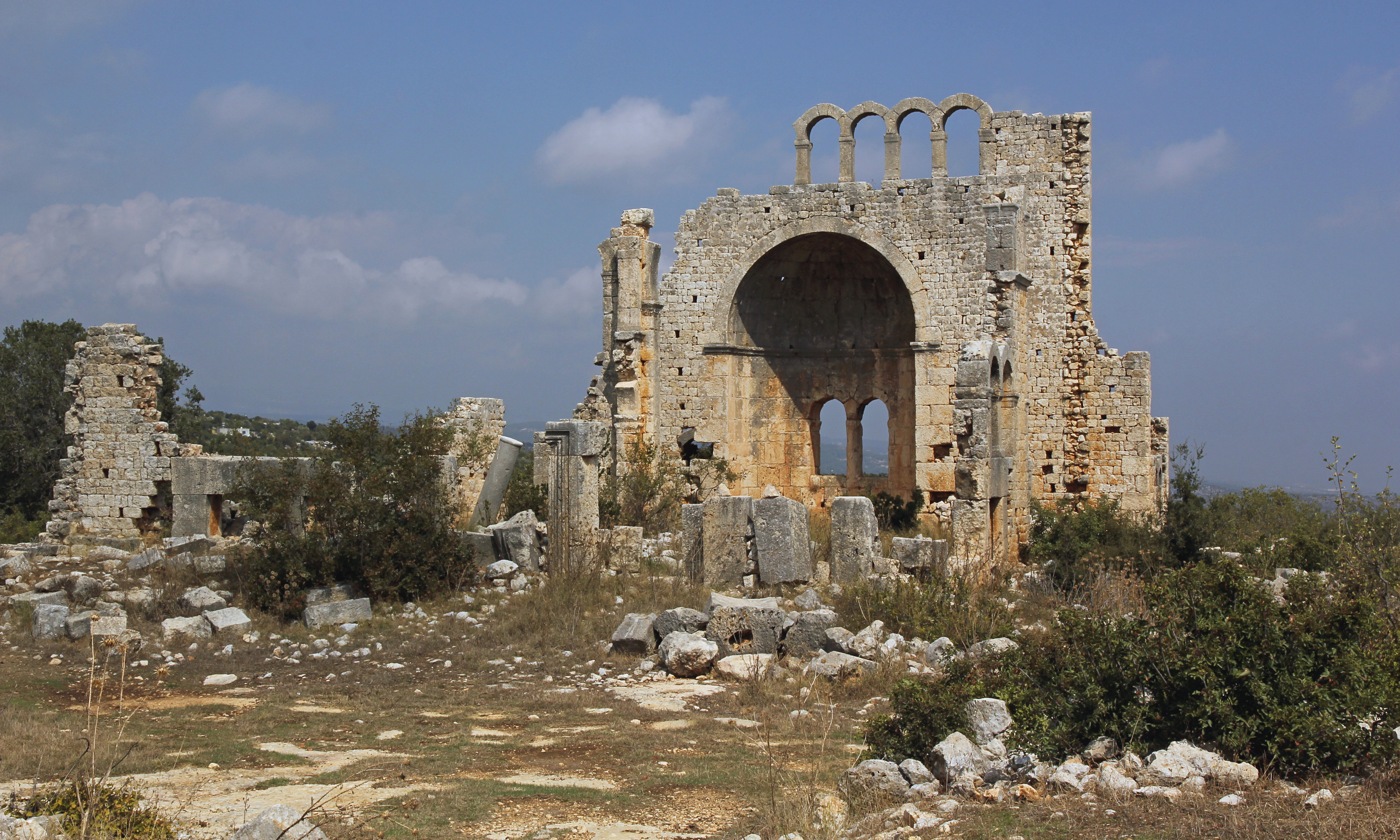 Öküzlü, römische Siedlung nahe Kızkalesi, Südtürkei, Basilika von Süden